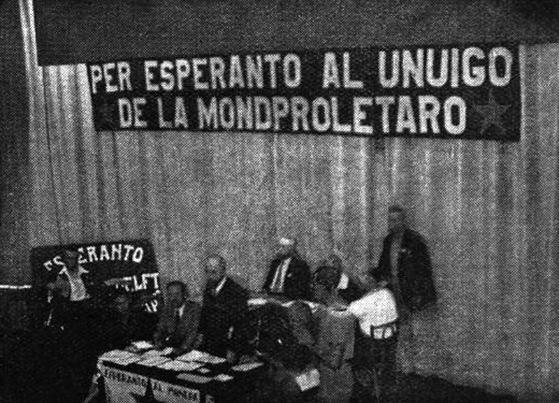 15-a SAT-kongreso en Parizo. La kongreseja podio kun la prezidantaro kaj oratoroj dum labor-kunsido.